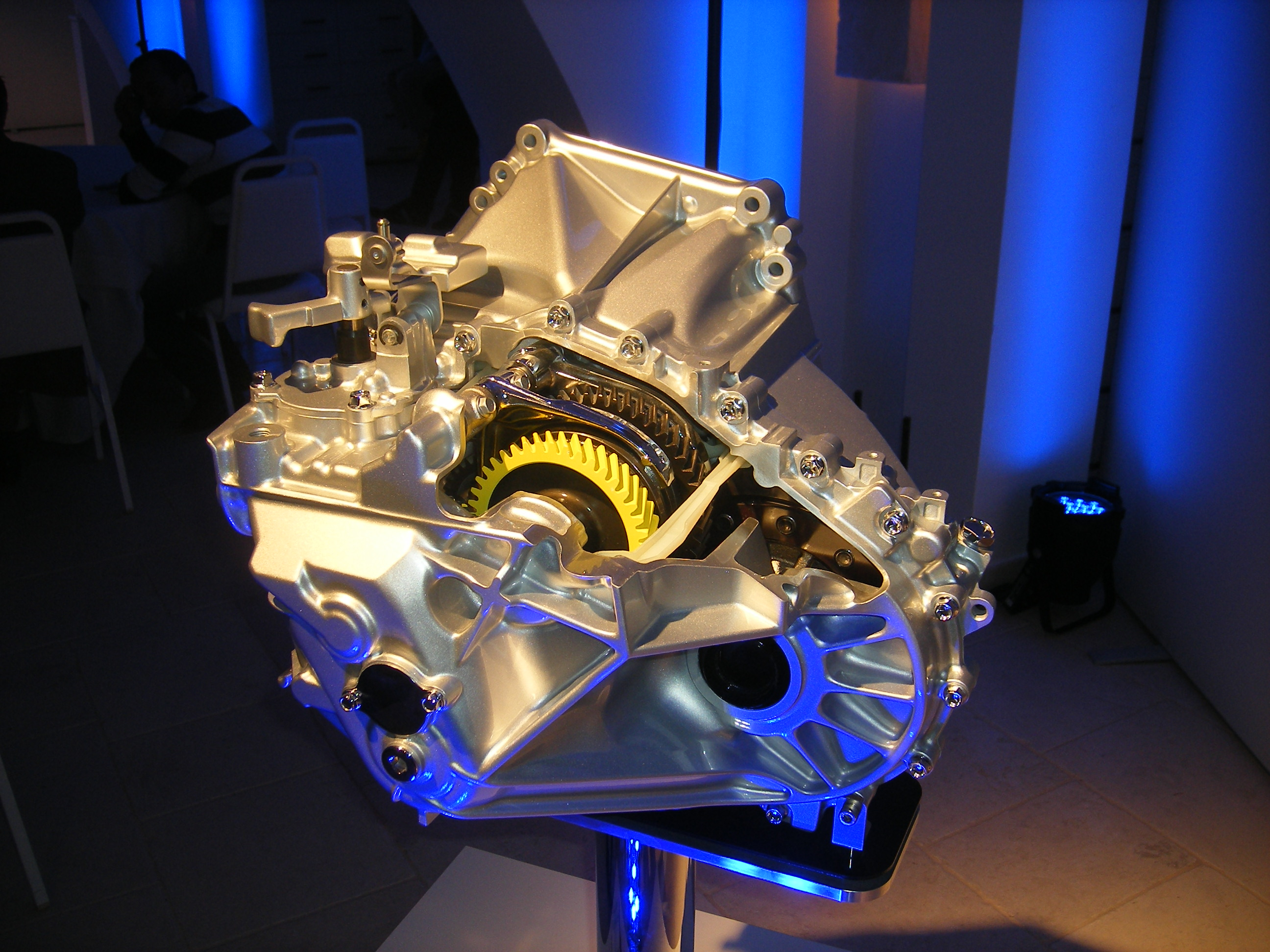 Transmisión manual de seis velocidades Skyactiv MT